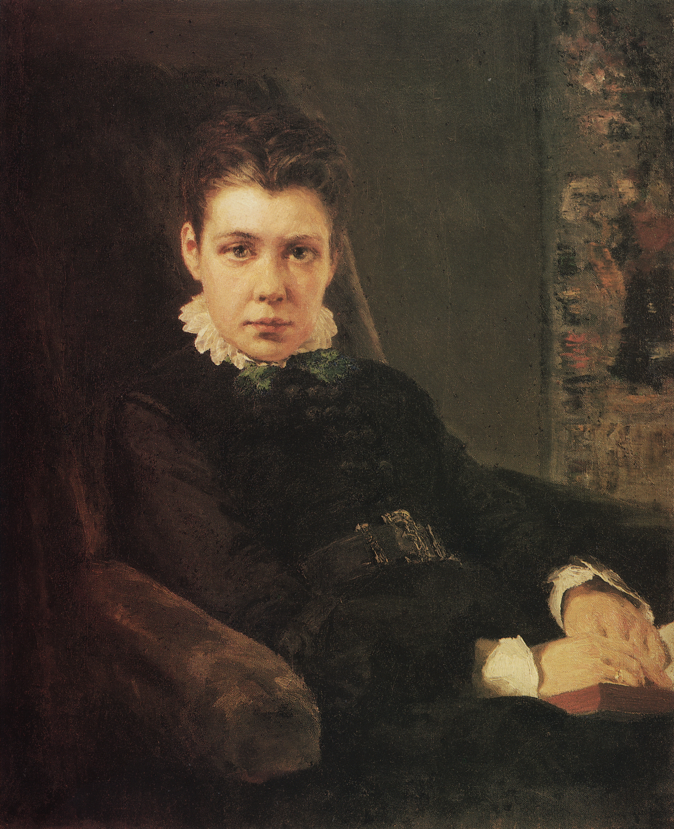 Портрет В. Д. Хрущевой, сестры художника